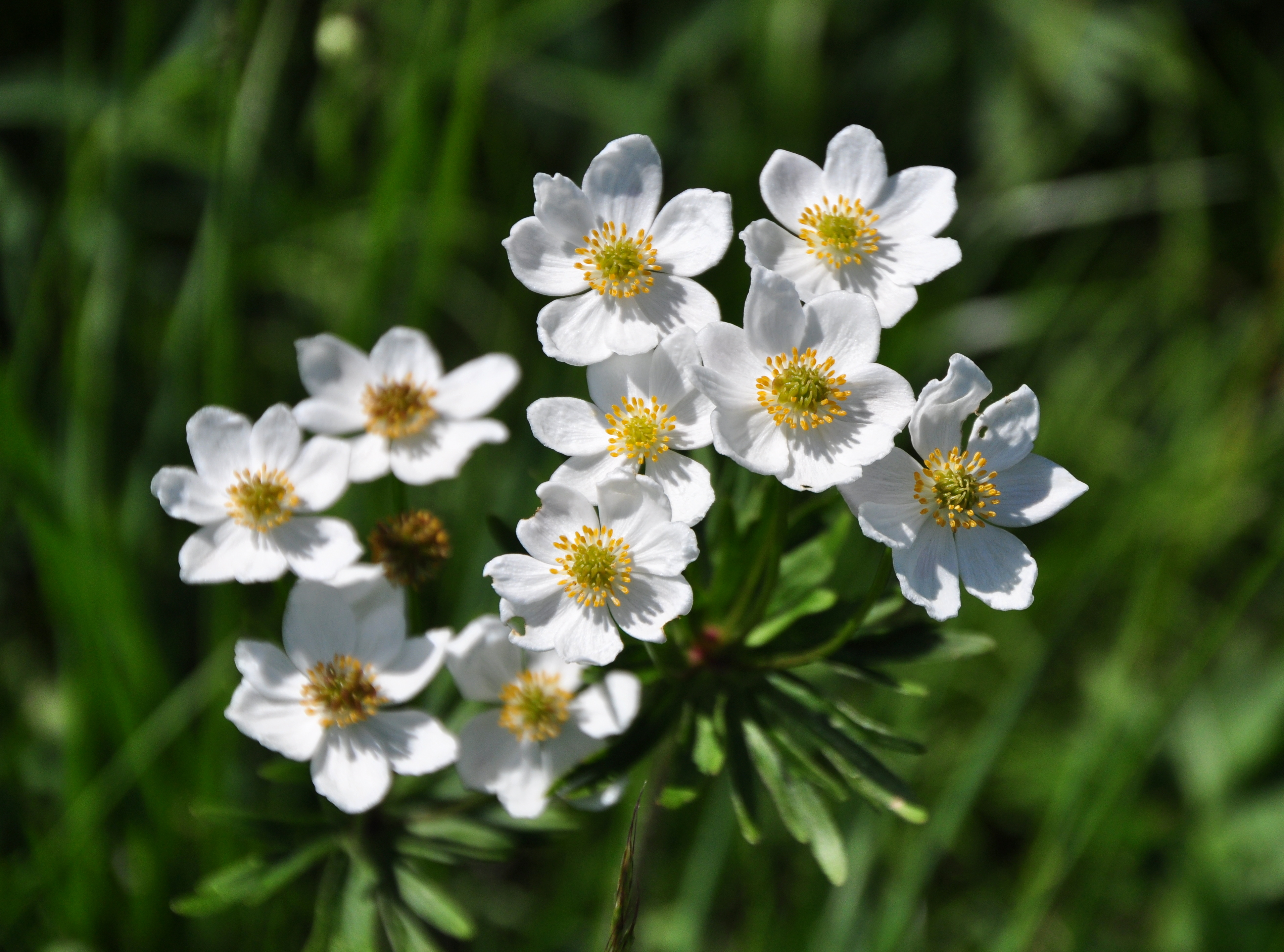 Andechs, OT Erling, Naturschutzgebiet „Mesnerbichl“. Im Juni blüht auf trockenen kalkhaltigen Hängen des Hügels das Alpen-Berghähnlein in verschwenderischer Fülle. Der Mesnerbichl ist der einzige außeralpine Wuchsort dieser Anemone in Deutschland.